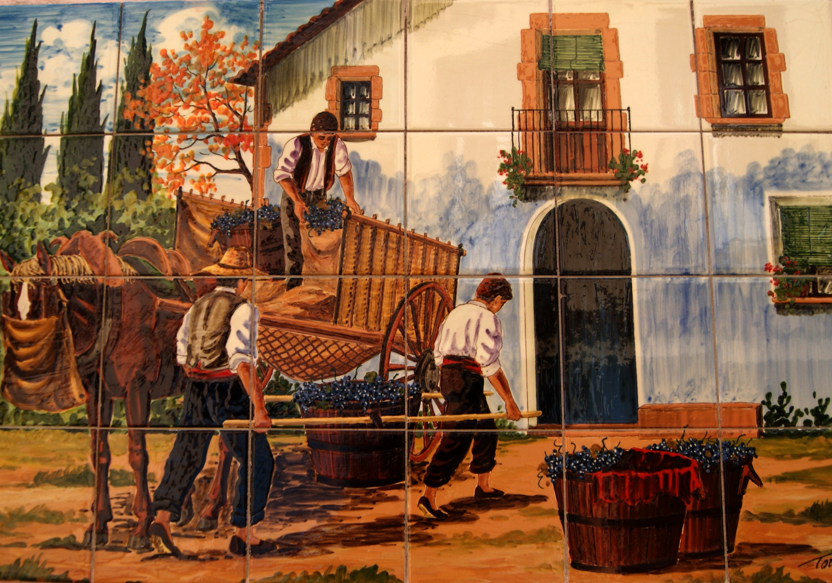 Rajoles des vendangeurs a Banyuls-sur-Mer, 1925